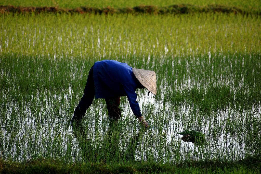 rizière vietnam